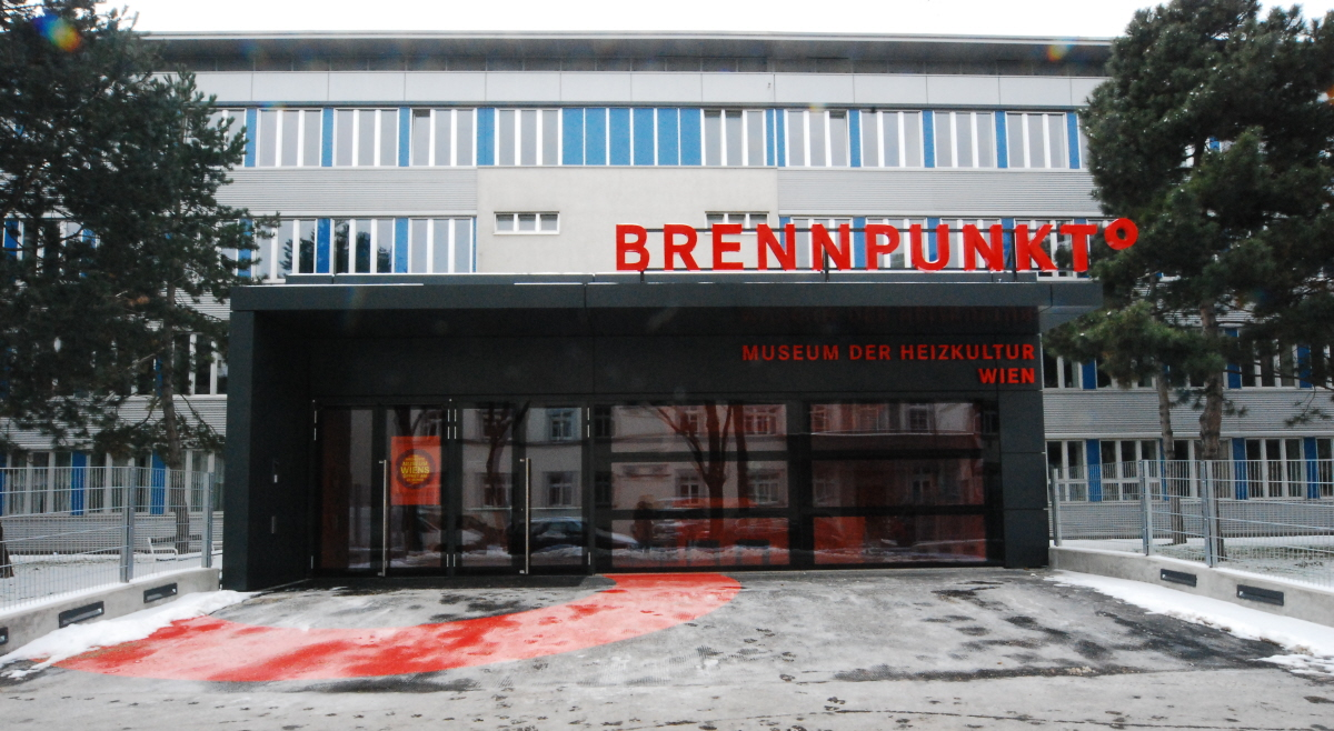 Der neu errichtete Eingang zum Heizungsmuseum Brunnpunkt in der Hans-Mandl-Berufsschule in Wien.